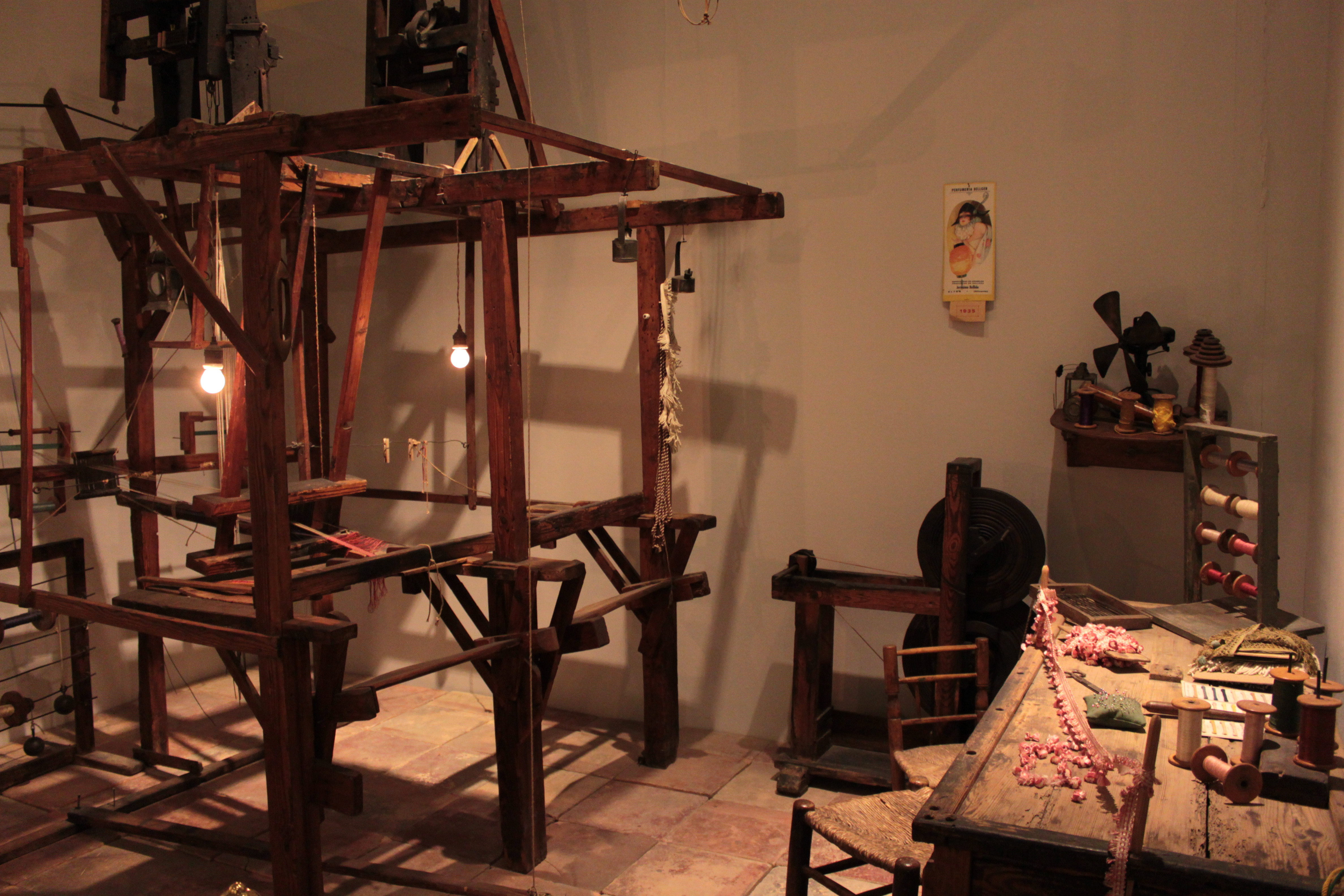 Recreación de un taller de Pasamanería del siglo XIX. Depositada en el Museo de Etnología de Valencia, Comunidad valenciana, España.